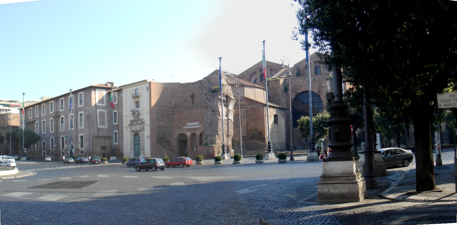 Roma, Terme di Diocleziano: prospetto verso l'Esedra